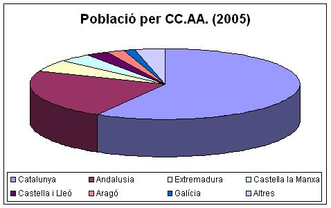 Població de Santa Coloma de Gnet distribuida per CC.AA